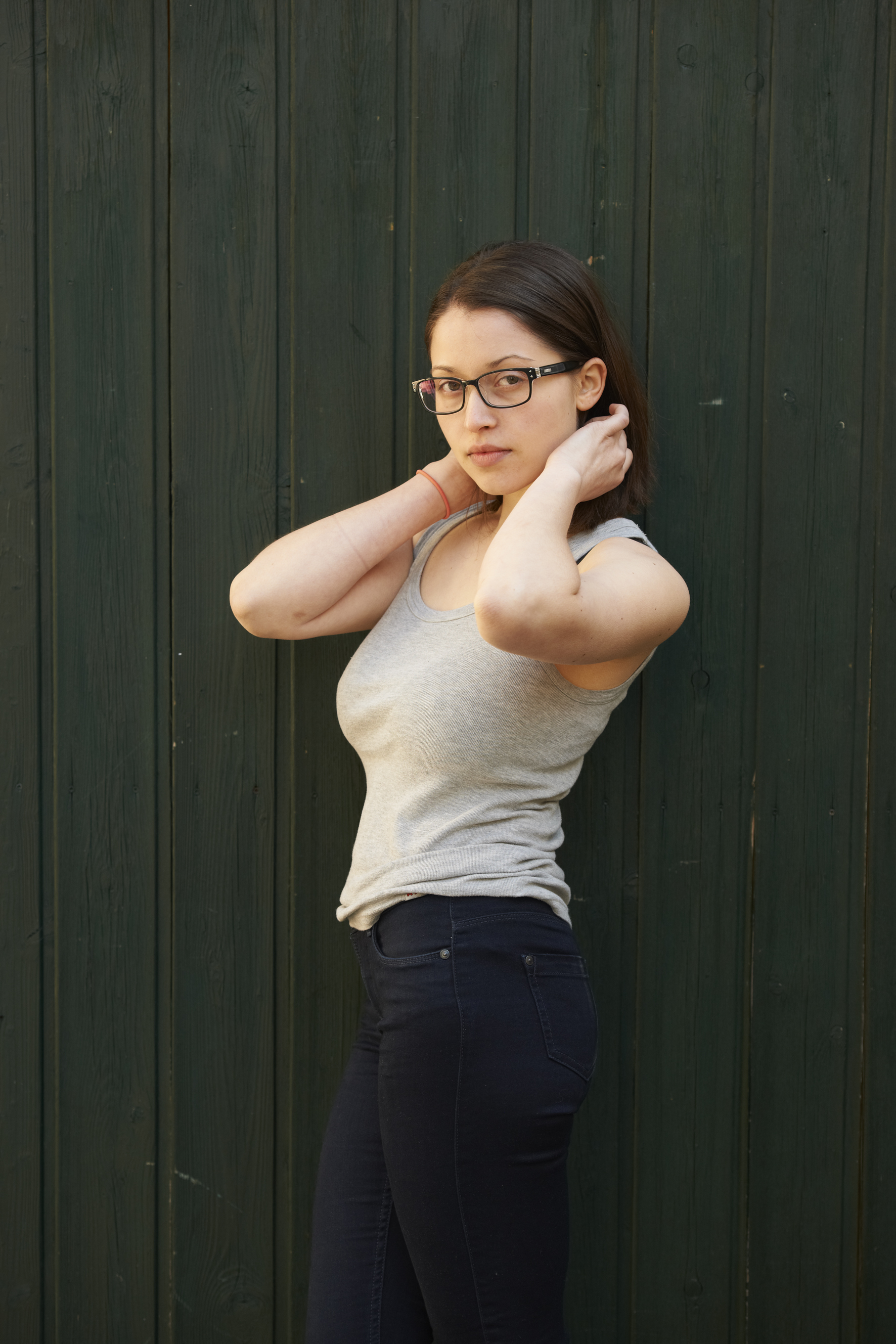 Portrait 2